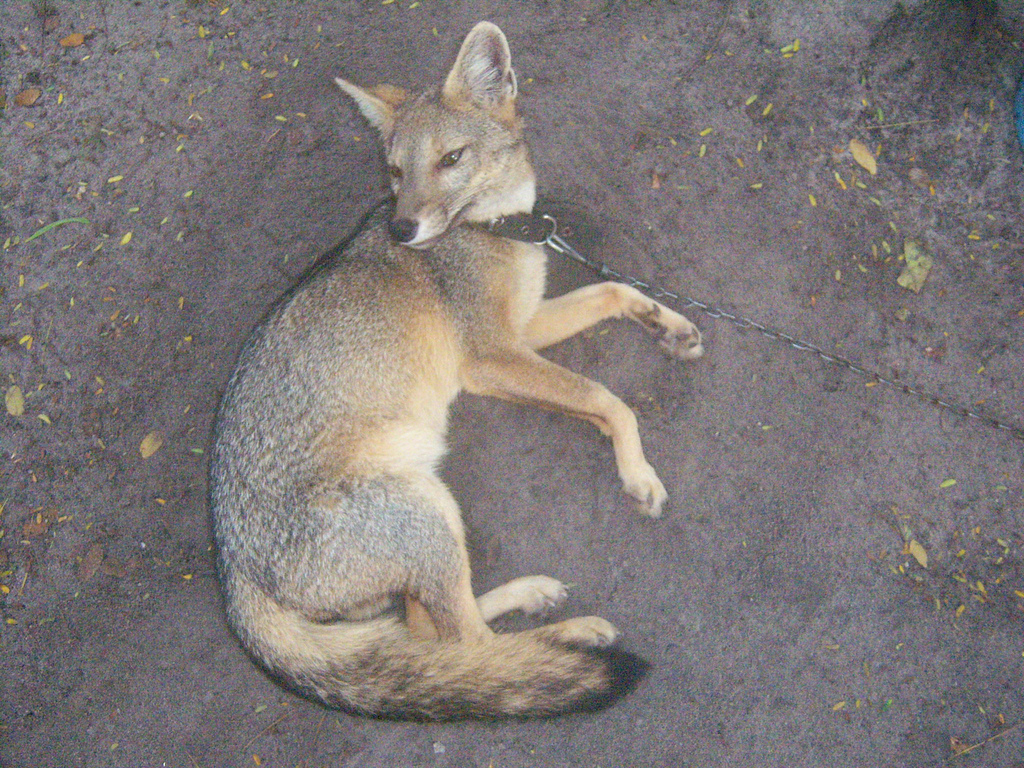 Uma raposa domesticada no interior do Ceará